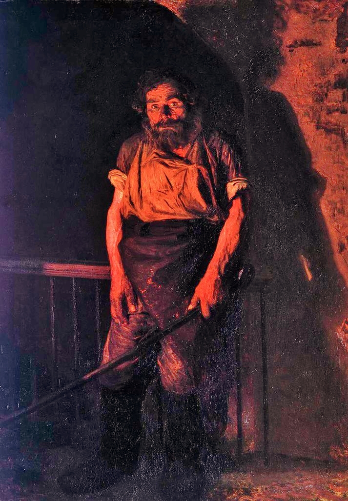 Il fuochista